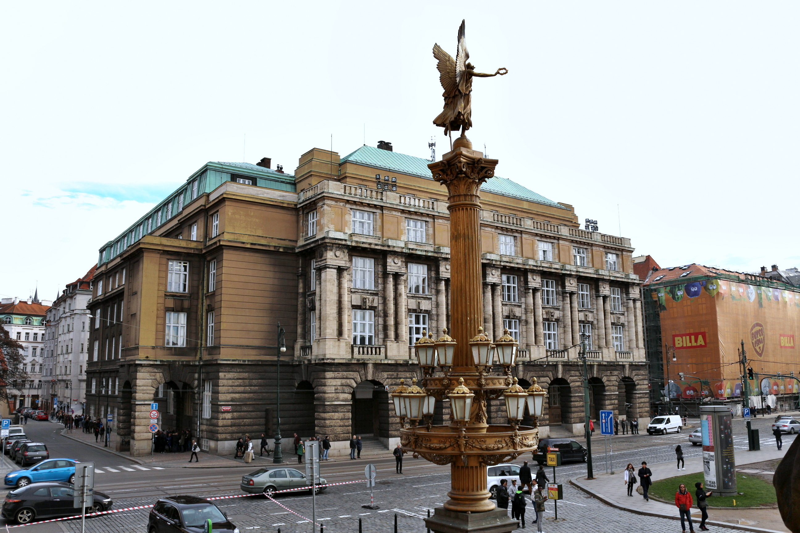 Budova Filosofické fakulty Univerzity Karlovy v Praze, Palachovo náměstí